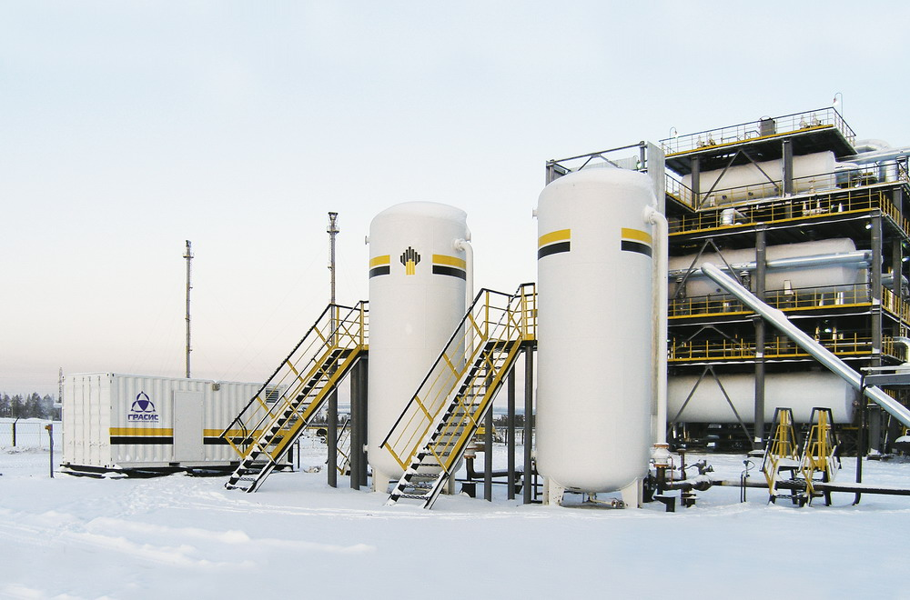 Стационарная установка азотного пожаротушения